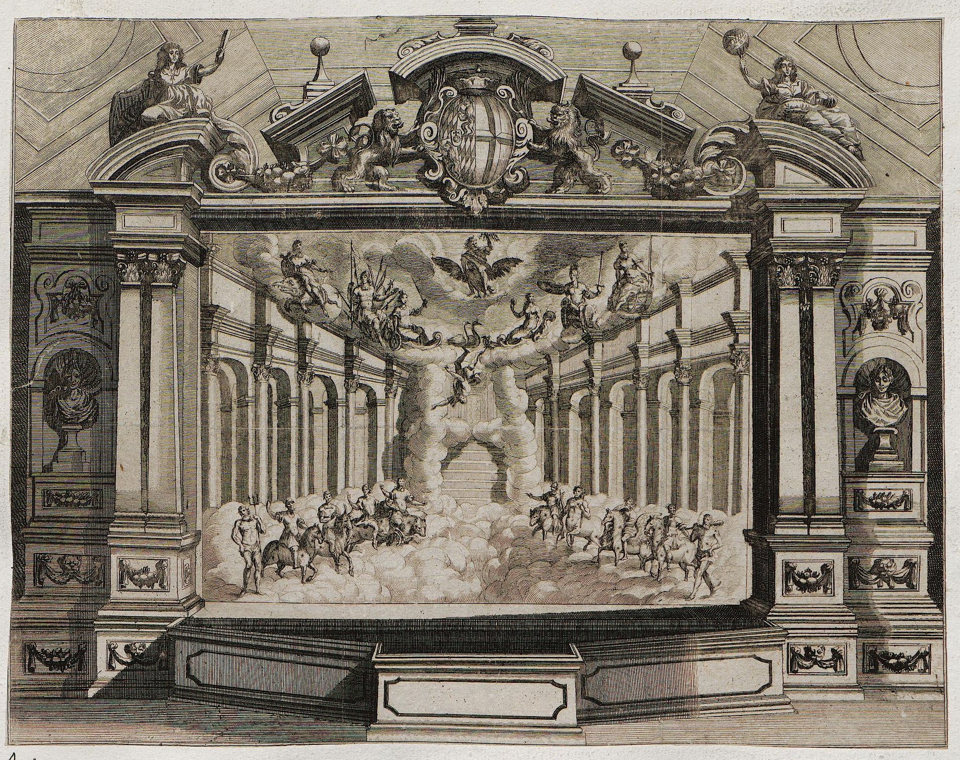 Grafik aus dem Klebeband Nr. 15 der Fürstlich Waldeckschen Hofbibliothek Arolsen Oper "Fedra incoronata" von J. C. Kerll, aufgeführt zum "Churfürstlich Bayerischen Frewden-Fest" 1662 in München; Bühnenbild von Francesco Santurini Prolog, II. Bild, Der Himmel mit Göttern